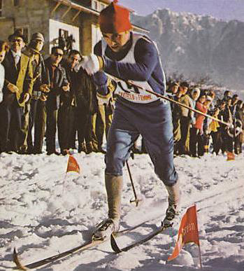 Il fondista italiano Franco Nones